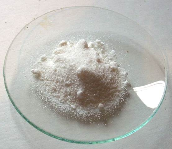 (NH4)6Mo7O24